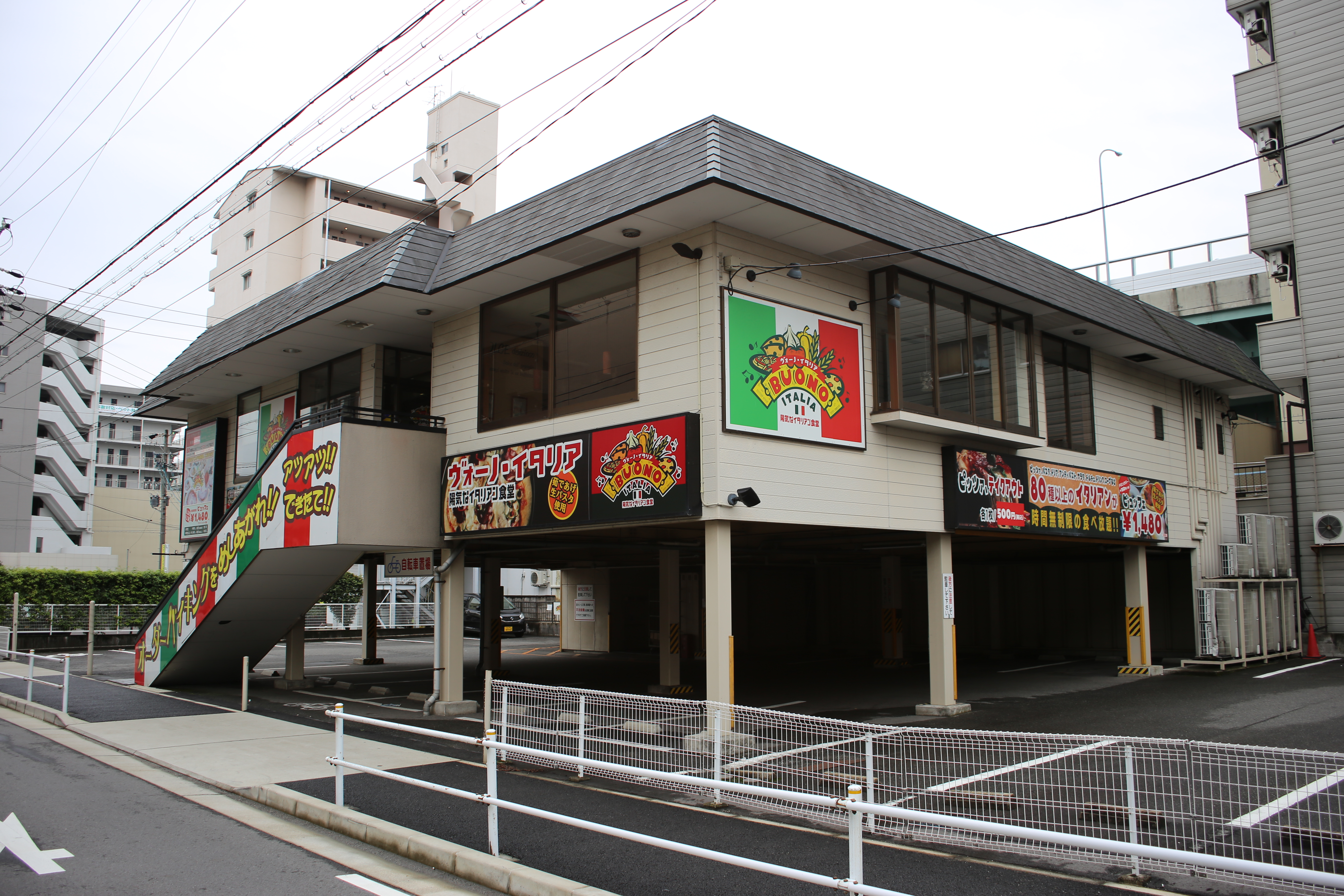 名古屋市北区志賀町のヴォーノ・イタリア黒川店を東側公道北側より撮影